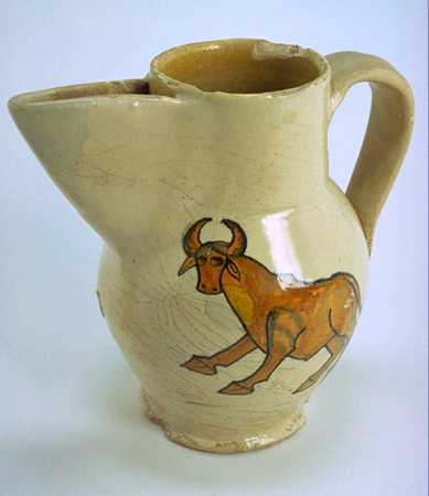 Panata di Viterbo del XV secolo